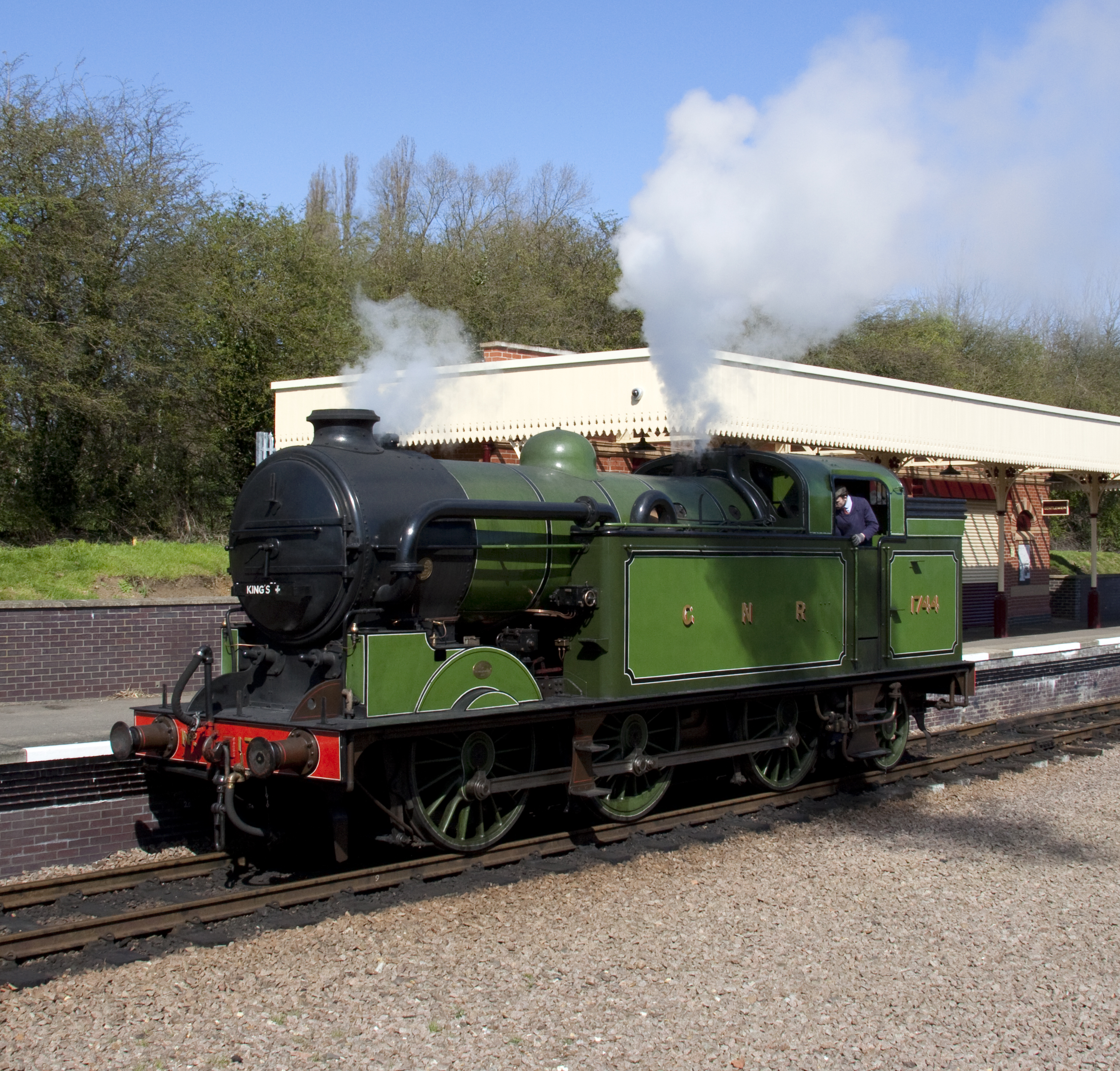 GNR 1744 2